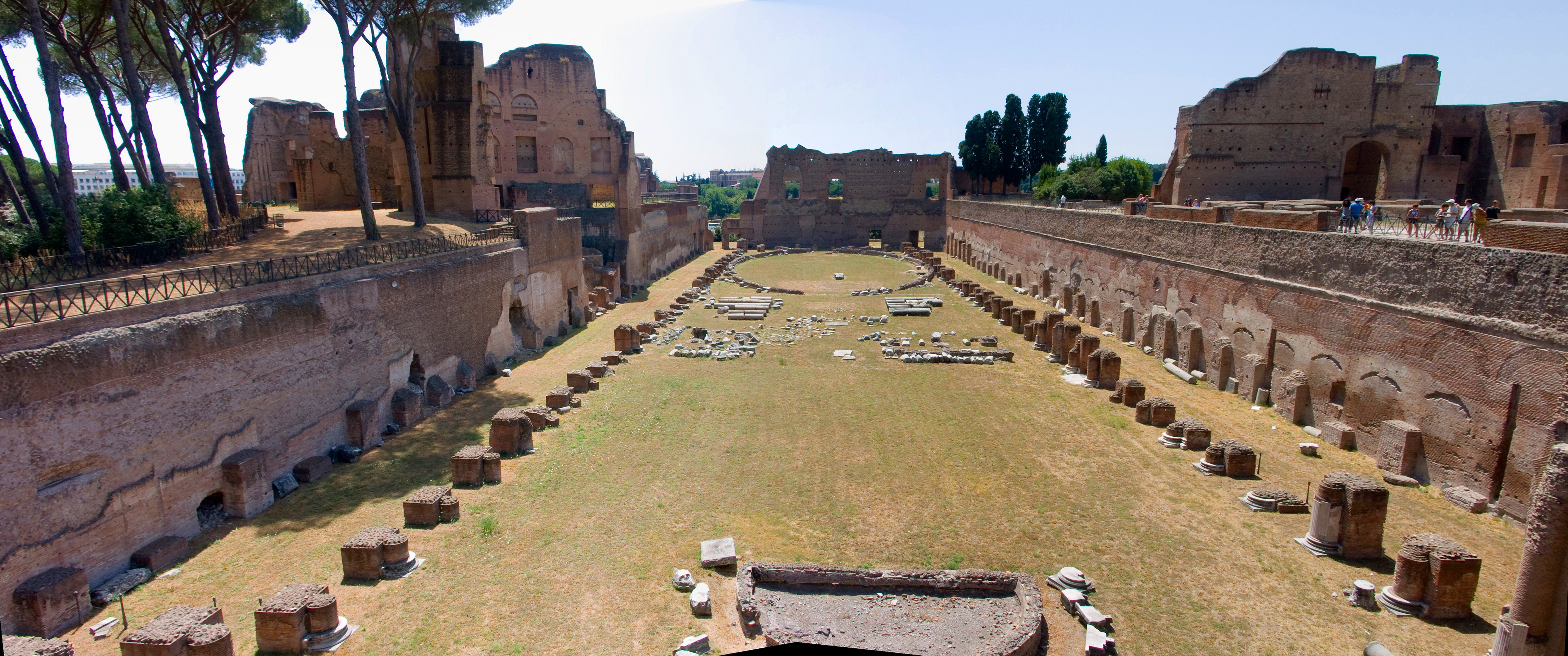 41°53′17.3″N 12°29′16.7″E / 41.888139°N 12.487972°E